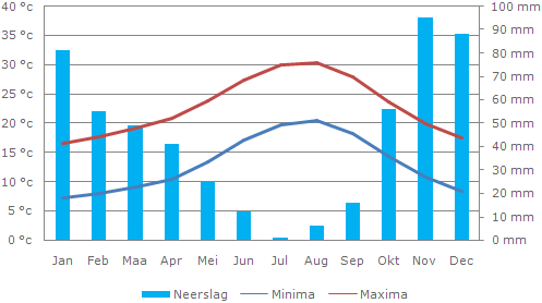 Klimatogram van de stad Málaga in het Zuiden van Spanje